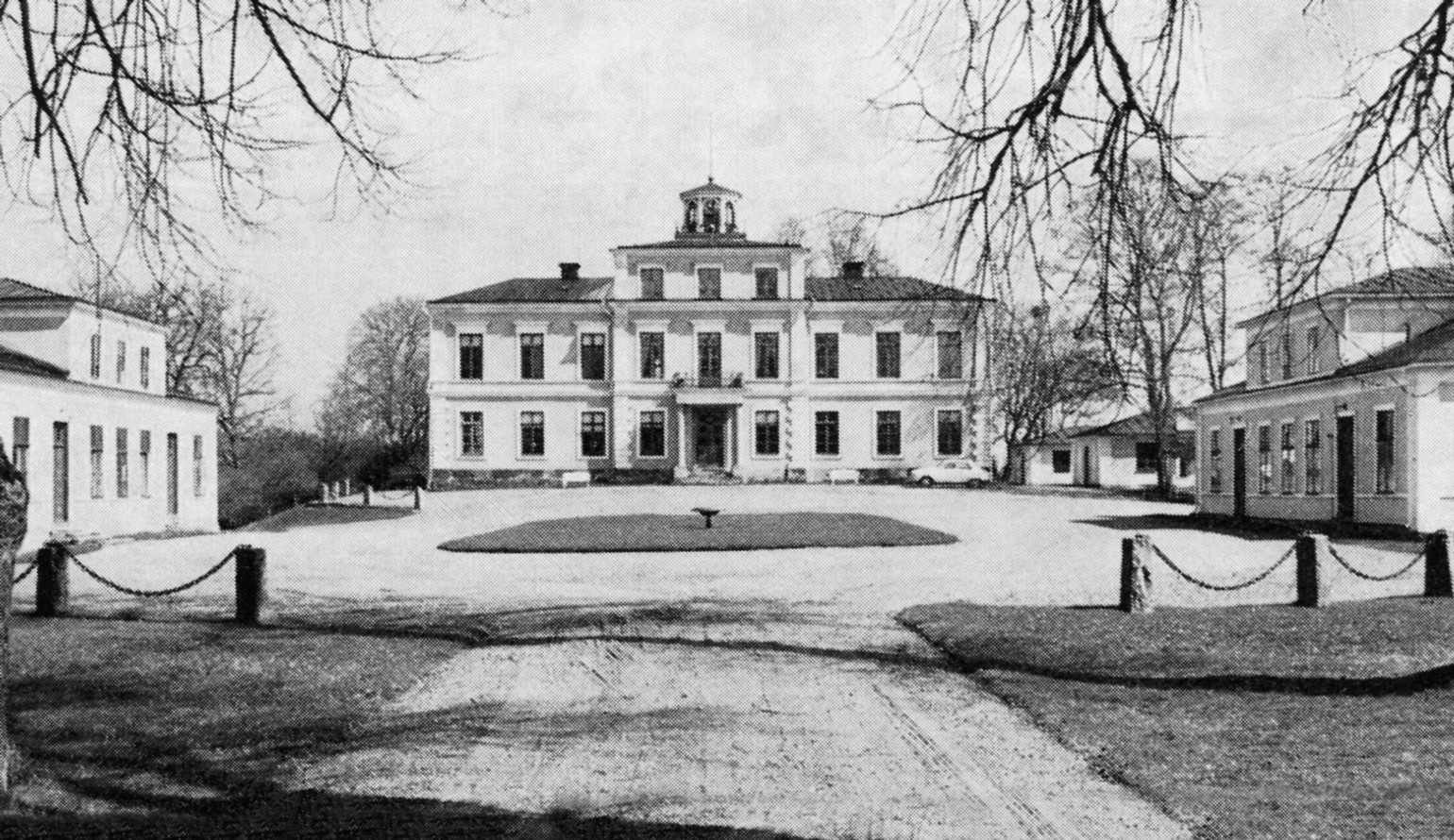 Stäringe herrgård